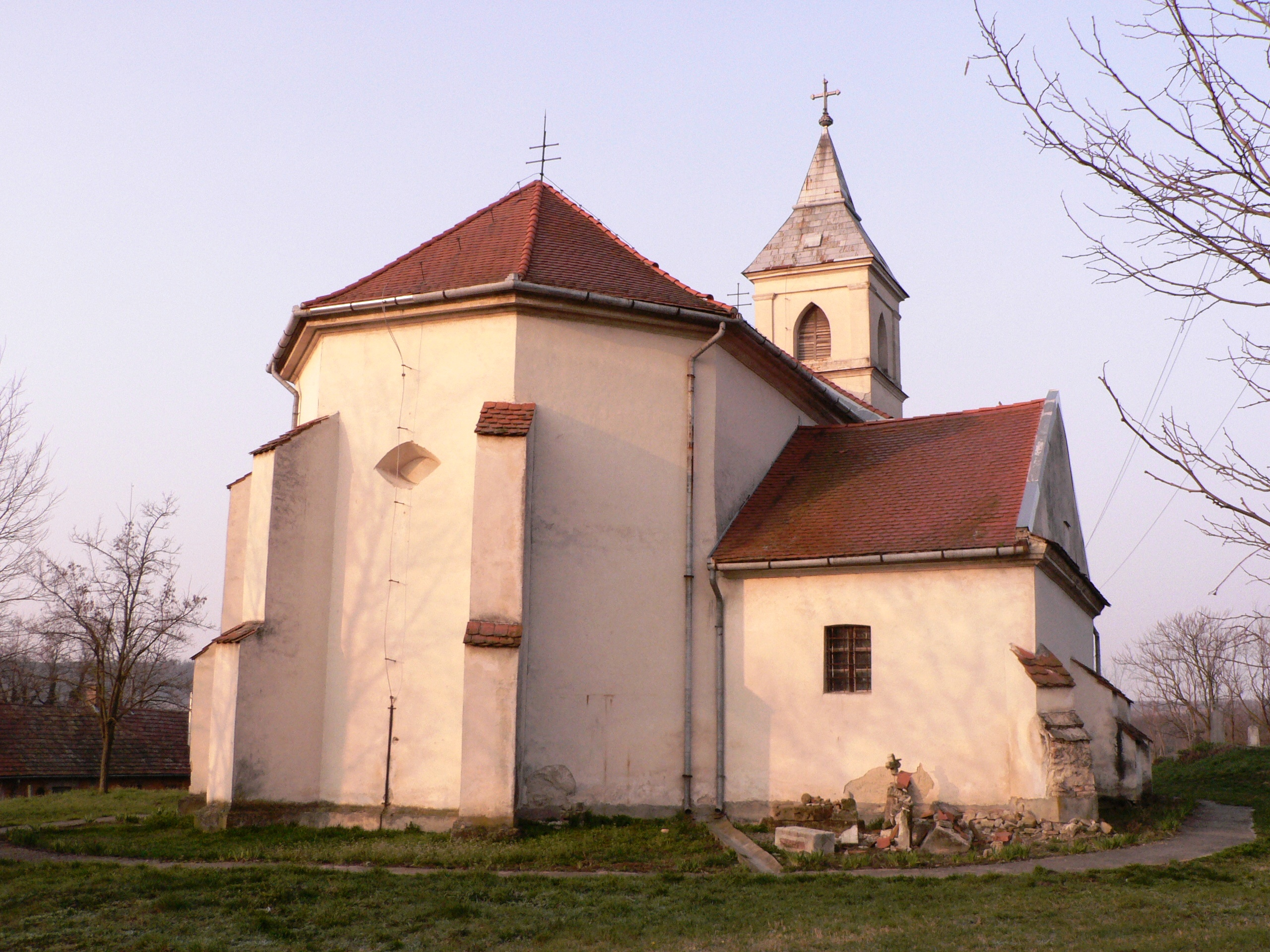 Felsőnyéki római katolikus templom